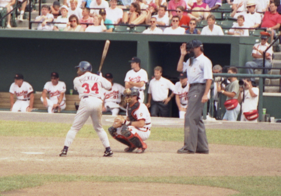 Kirby Puckett bats at Oriole Park at Camden Yards, 1993.